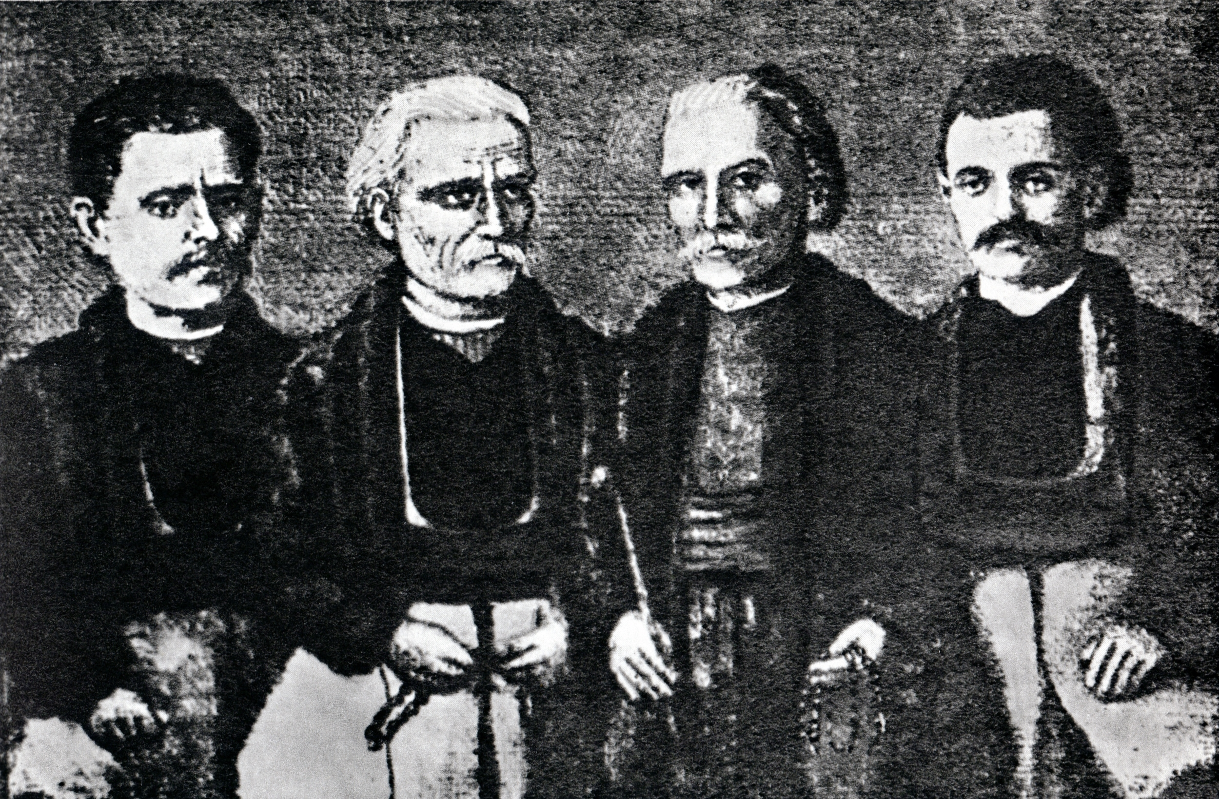 Зографите на църквата „Света Богородица“, Никола, Андрей, Георги и Коста